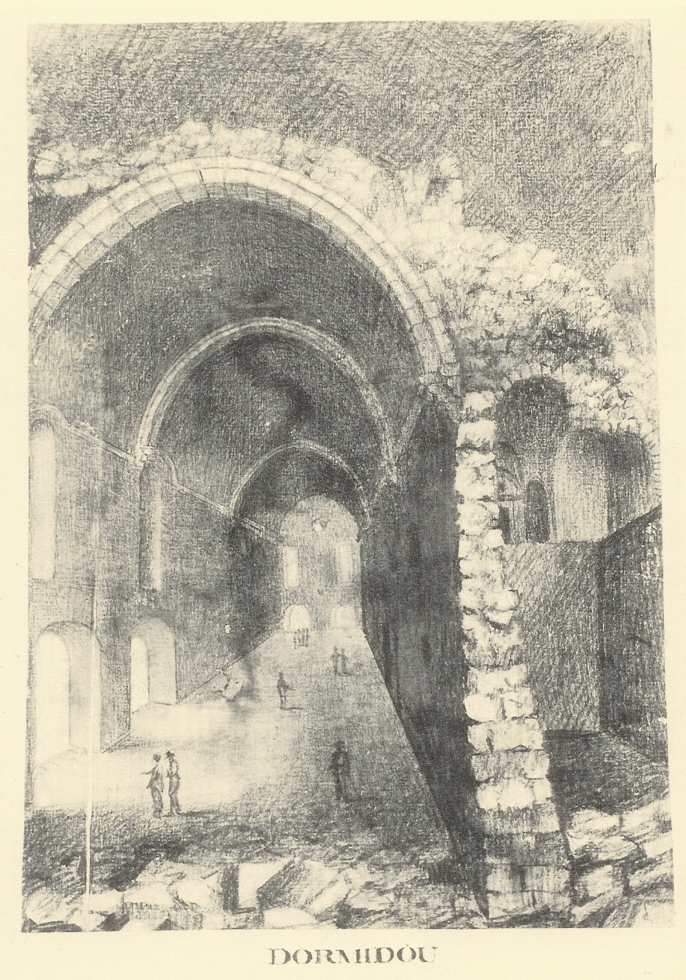 Dortoir de l'Abbaye de Saint-Victor de Marseille à la fin du XVIIIe siècle. Dessin au crayon (45 × 35 cm) par Joseph Marchand - Archives de Bouches-du-Rhône.